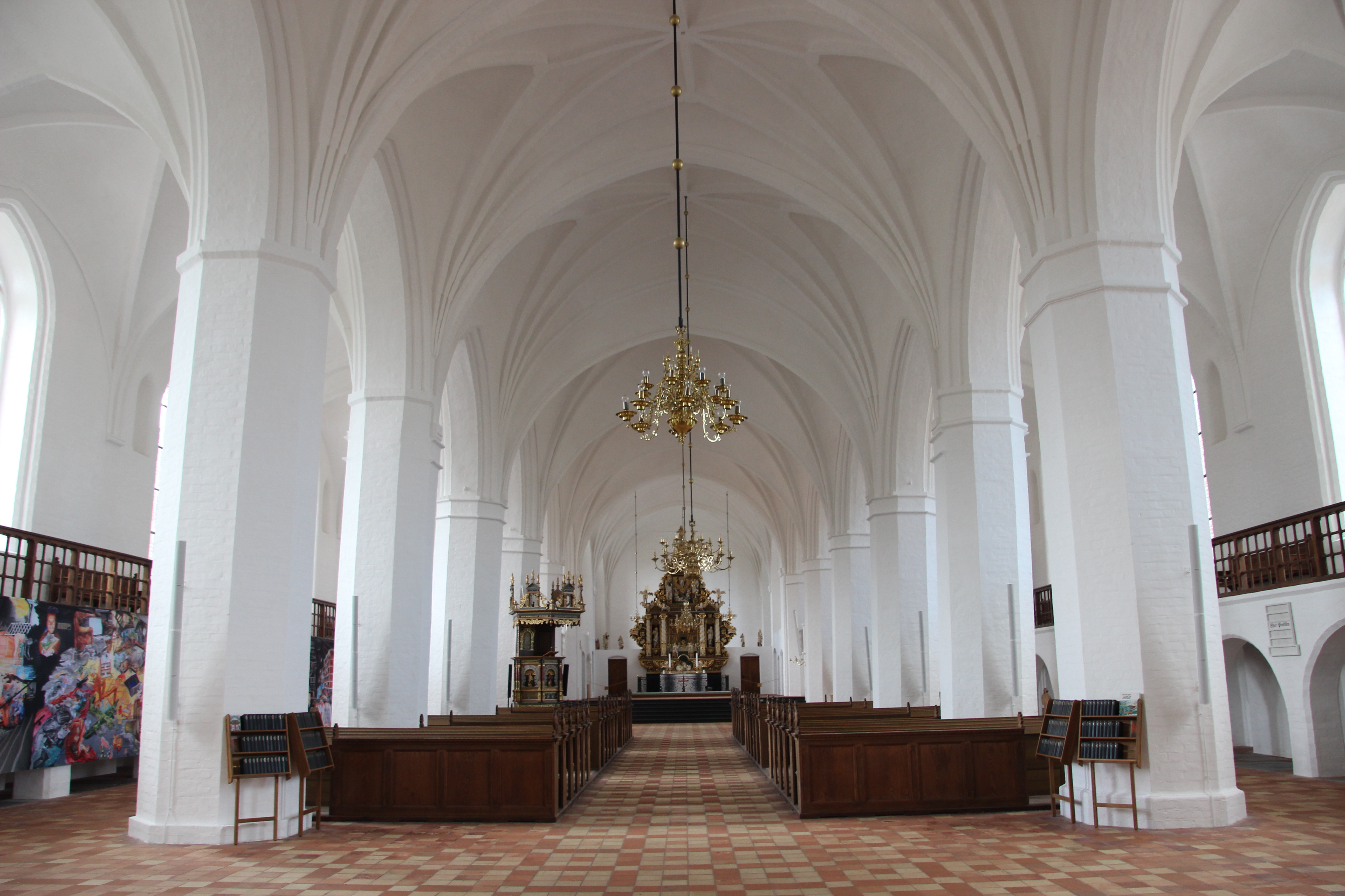 Innenraum der Maribo Domkirke